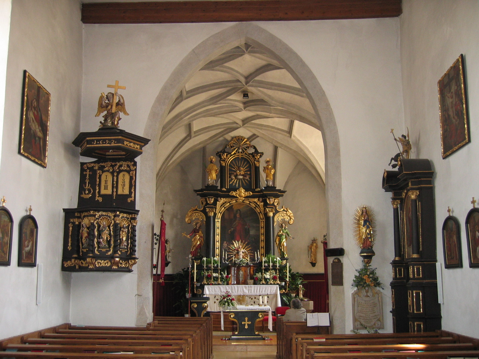 Pfarrkirche Rechberg innen